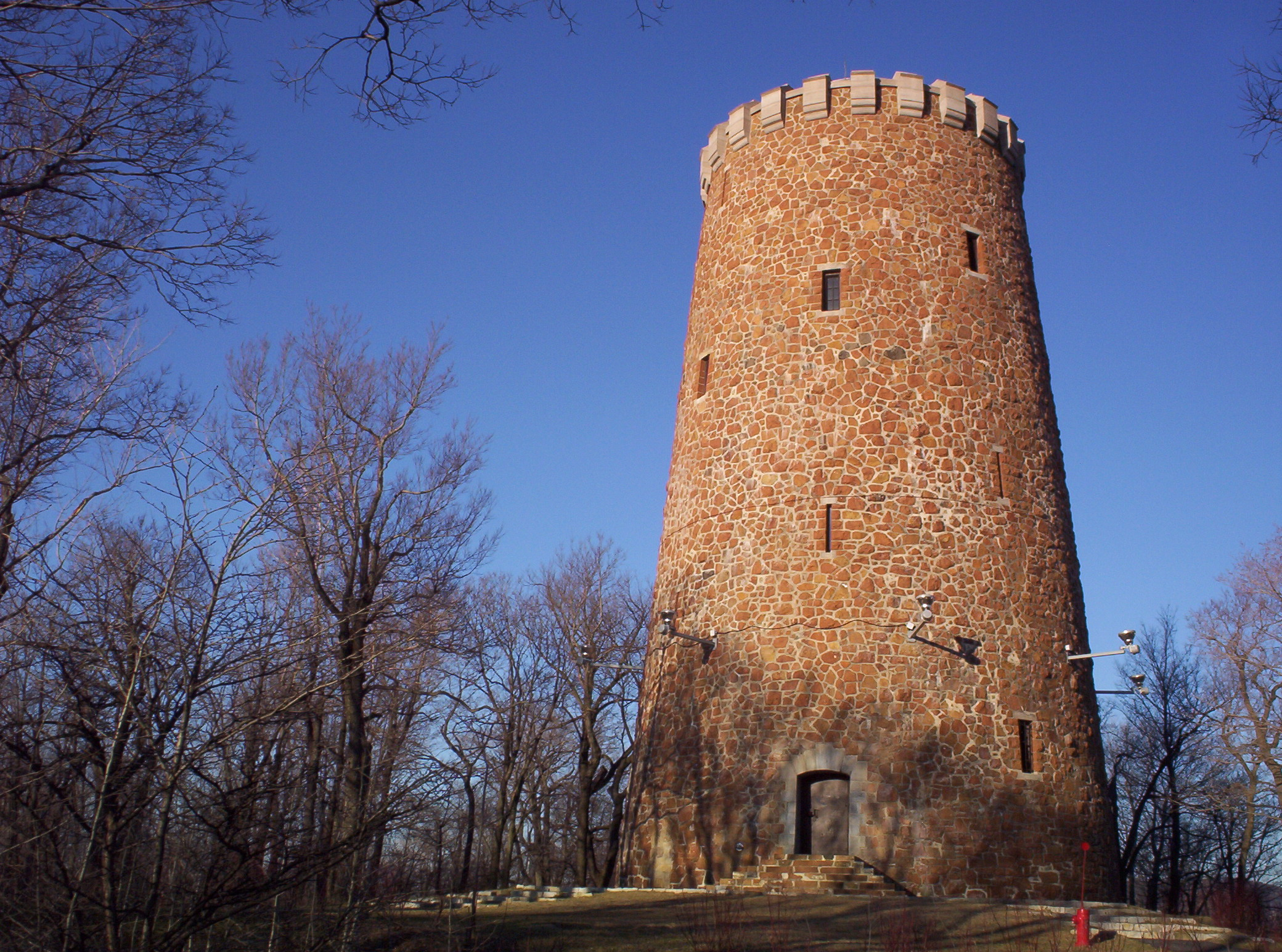 Tour Lévis, ancien château d'eau construit en 1936, situé sur l'île Sainte-Hélène, Montréal. Il ne fait pas partie du fort de l'île Sainte-Hélène, malgré ce que l'on peut croire.